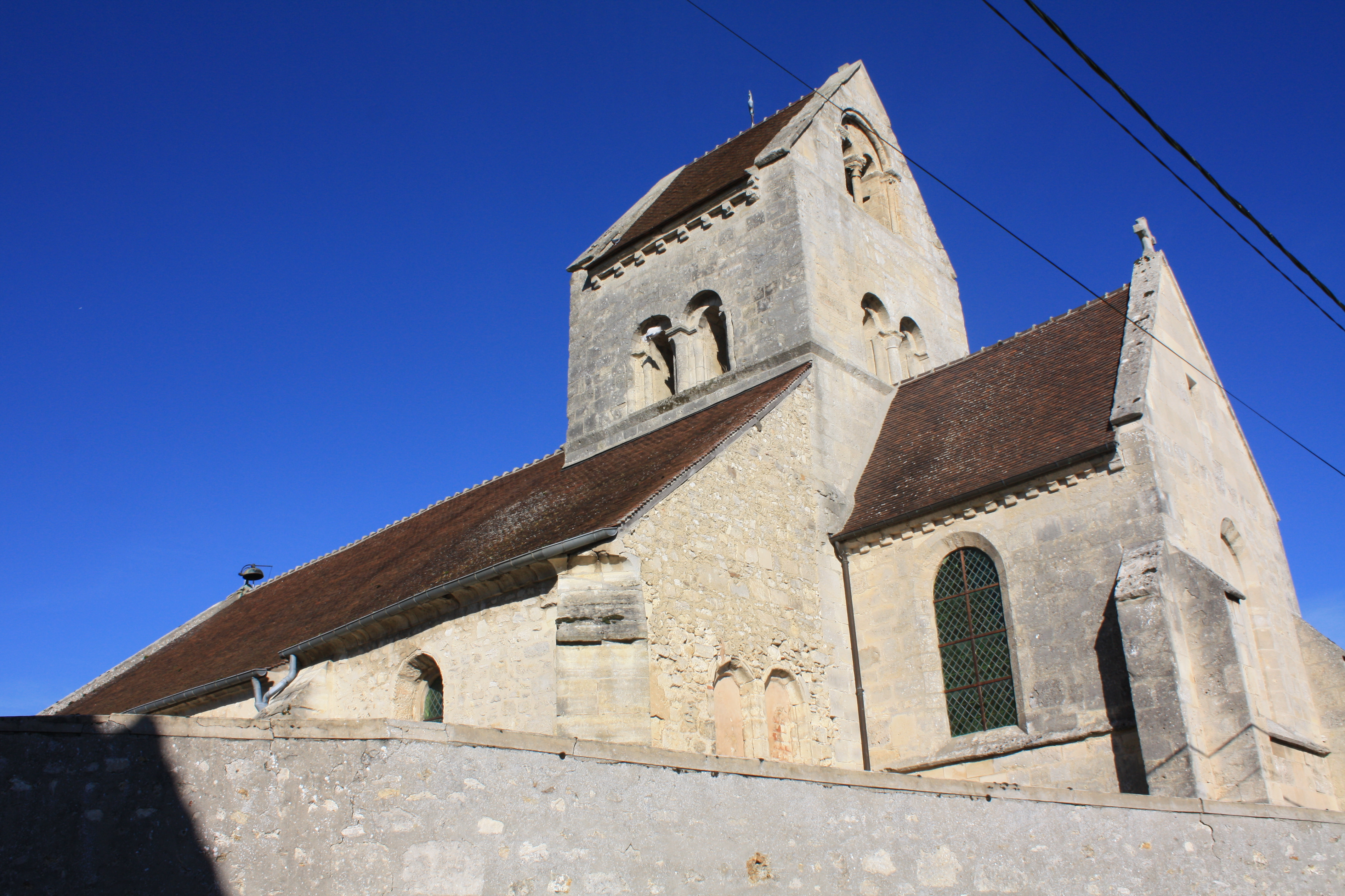 Église Saint-Pierre de Dravegny